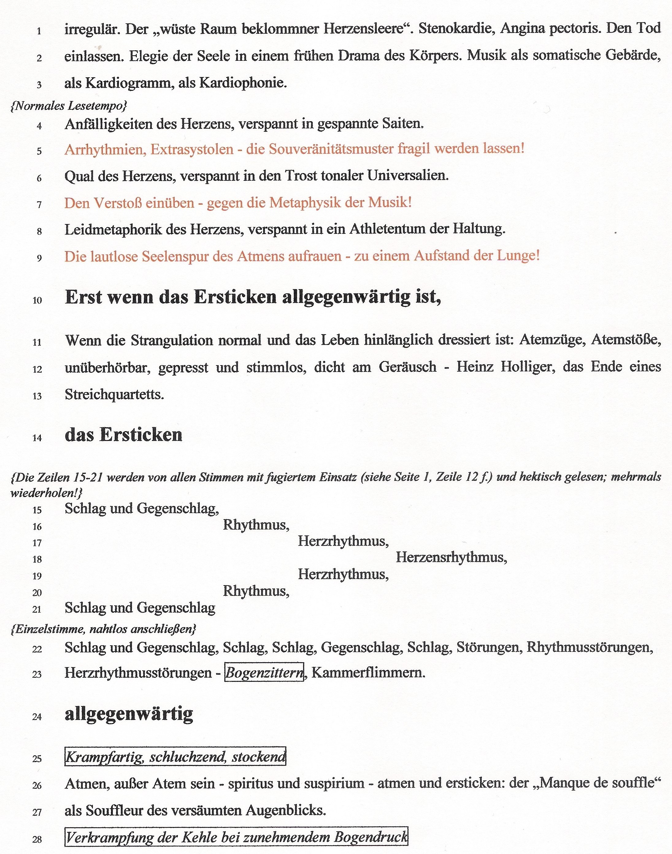 Johannes Bauer, ATMEN (Experimentelle Sprechpartitur für das Ensemble "Die Maulwerker" zu Beethovens Cavatina und Heinz Holligers Erstem Streichquartett), Uraufführung: Berlin 2008 [Ausschnitt].